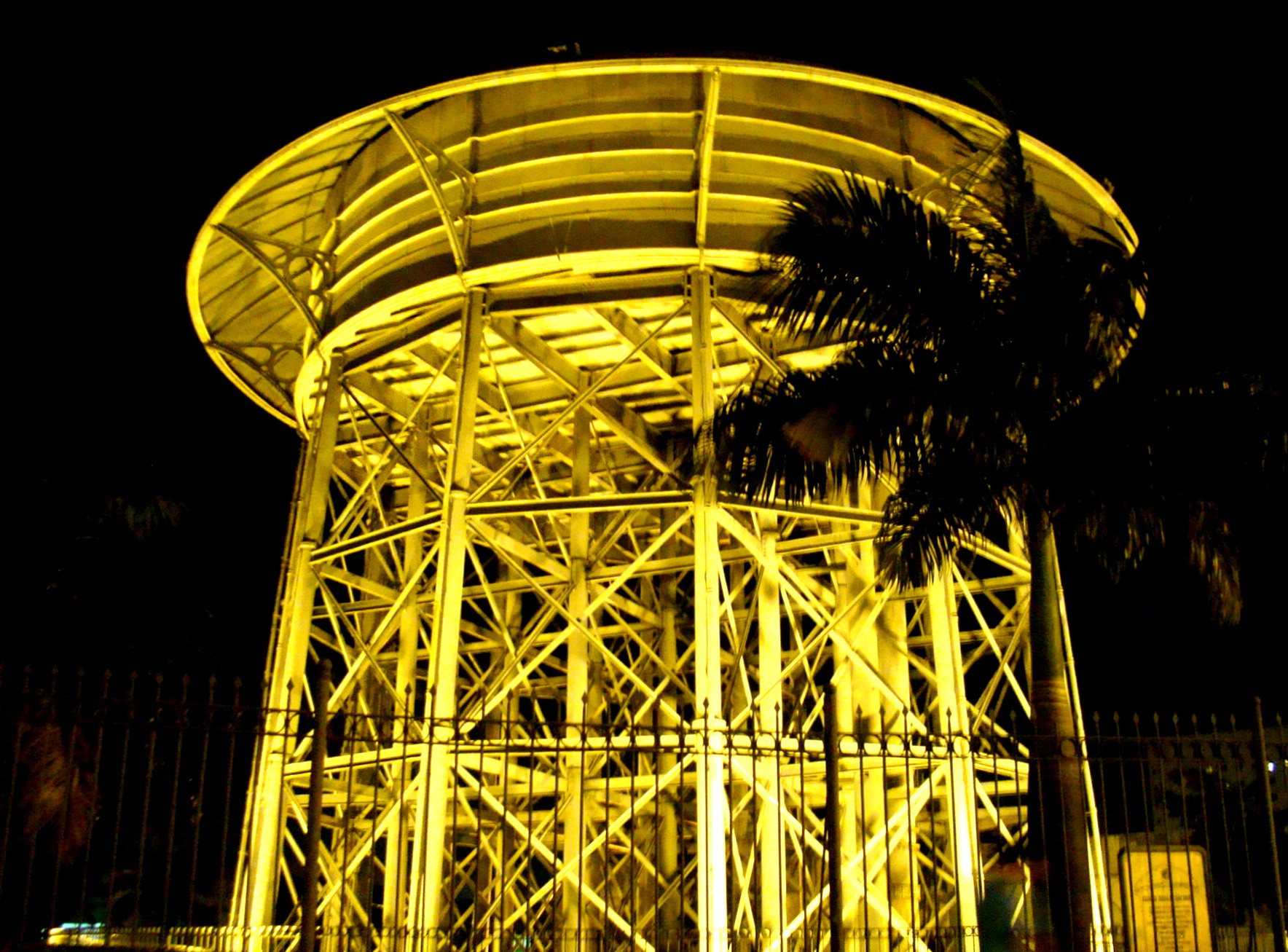 Antiga Caixa D`água de São Brás, em Belém